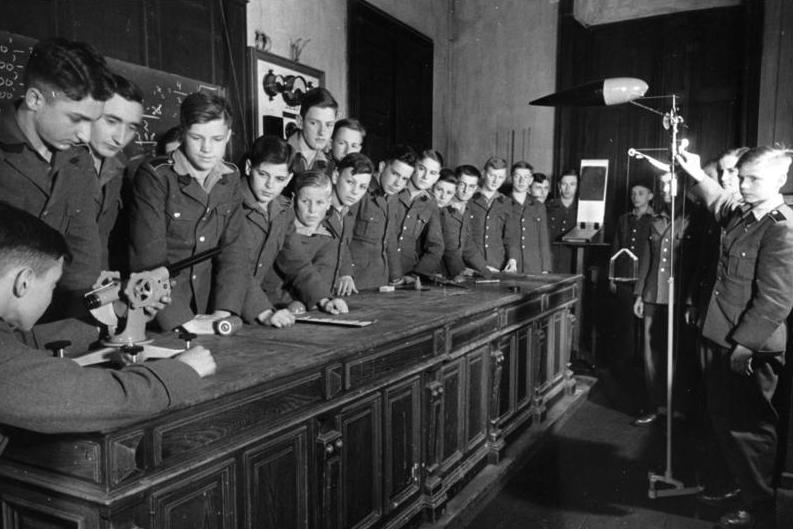 4/ Nationalpolitische Erziehungsanstalt Der Unterricht der nationalpolitischen Erziehungsanstalt kommt im großen und ganzen dem der Oberschulen gleich. Jedoch kommt in stärkeren Maße der Wehrgedanke zu seinem Recht. Durch Modellversuche werden in der Physikstunde unter Leitung des Erziehers die Vorgänge beim Schuß erläutert. Ein anderer Versuch (rechts) dient dem Verständnis für Luftwiderstand an verschieden geformten Flugkörpern.